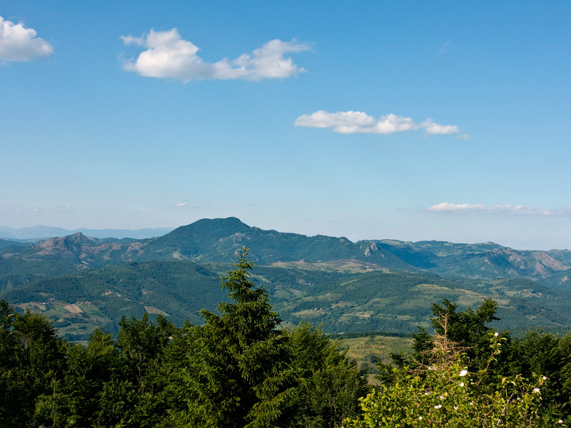 Поглед на планину Рогозну (Јелеч) са Мокре Горе, фото: Бојан Миловић